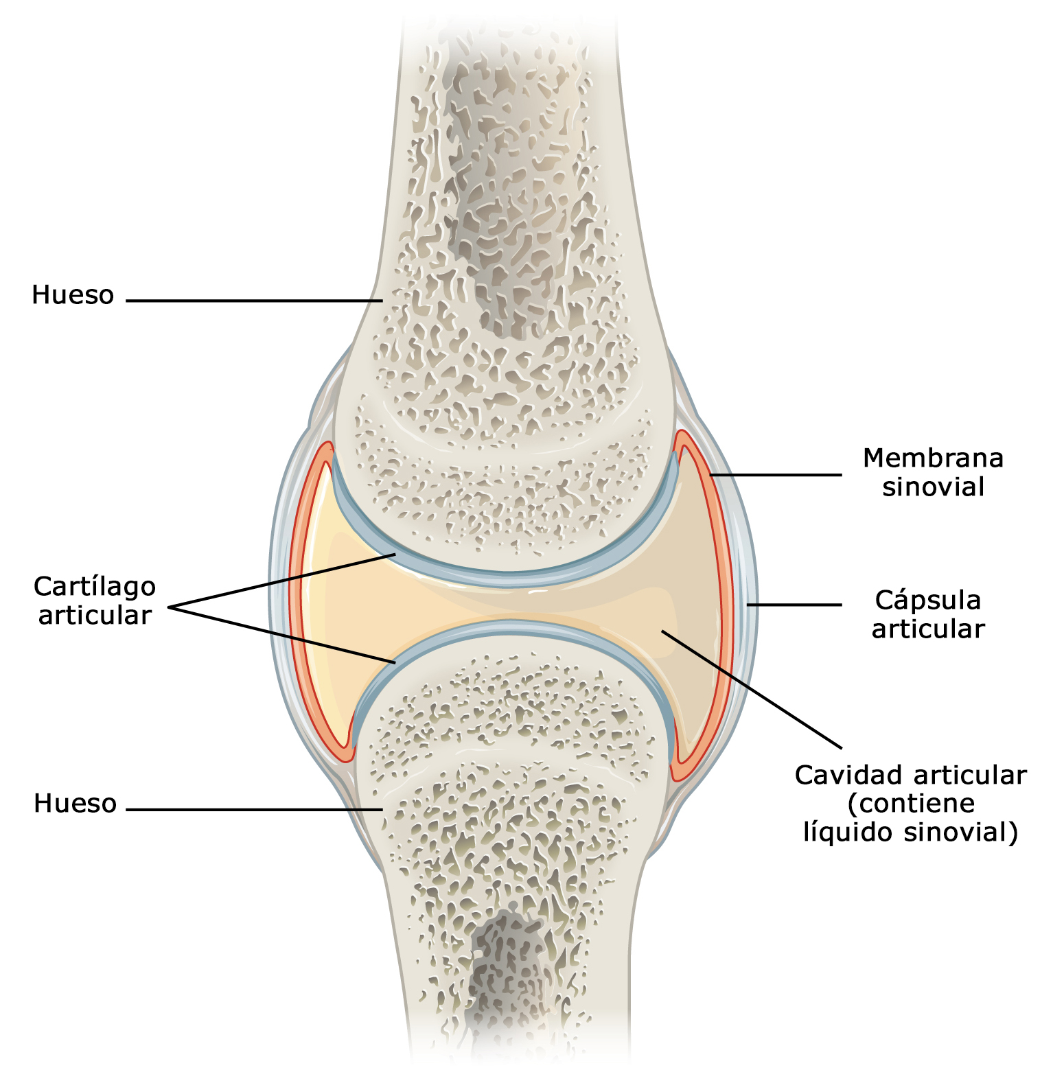 Esquema de una articulación sinovial en el que se representa el cartílago articular, la membrana sinovial y la cavidad articular.